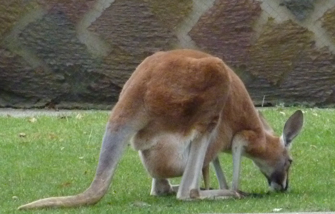 Känguru mit vollem Beutel, Zoo Heidelberg